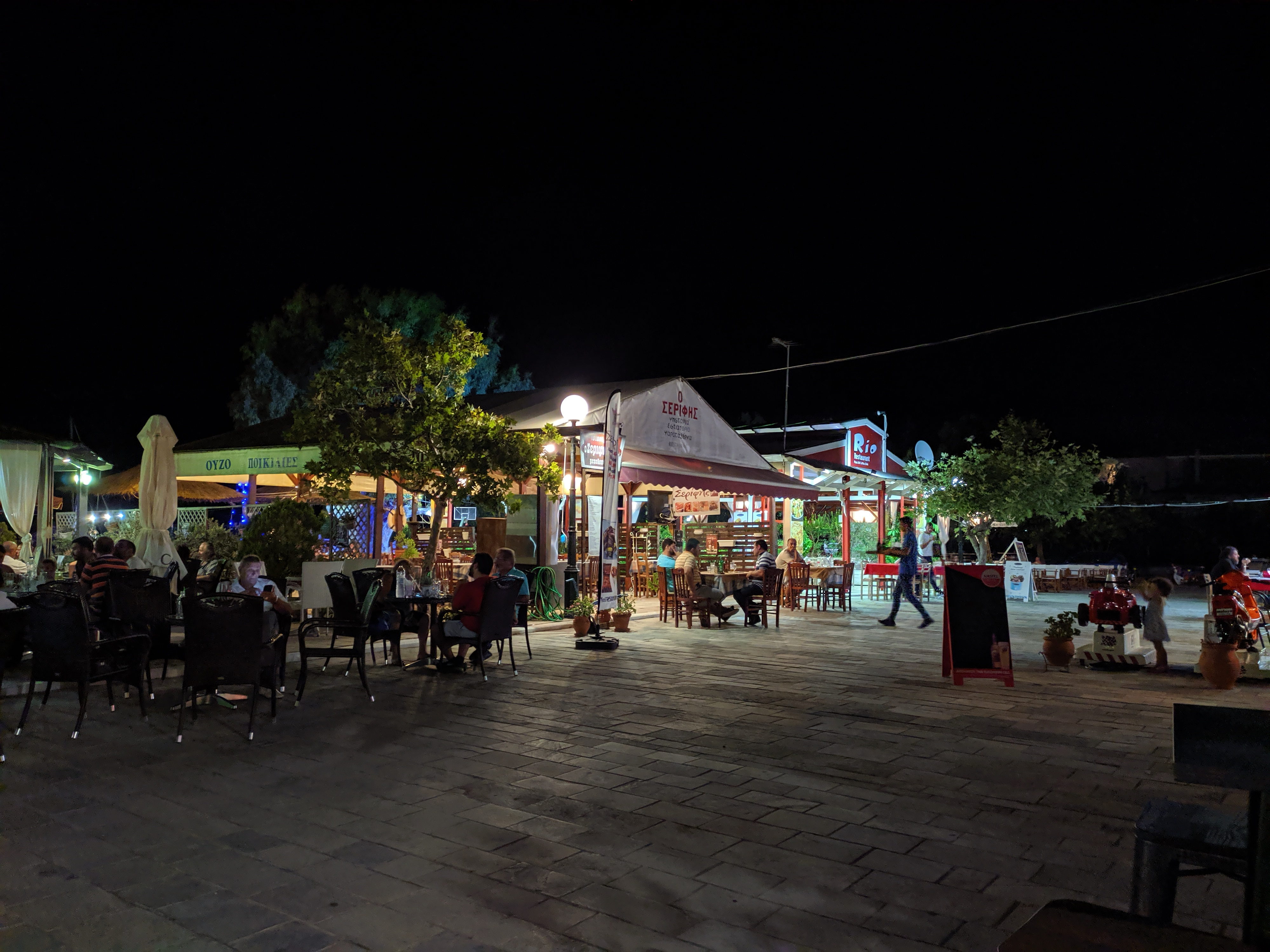 Κεντρικός πεζόδρομος (Άγιος Ανδρέας Μεσσηνίας).